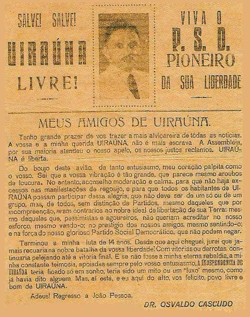 Panfleto jogado por Dr Oswaldo no dia da emancipação